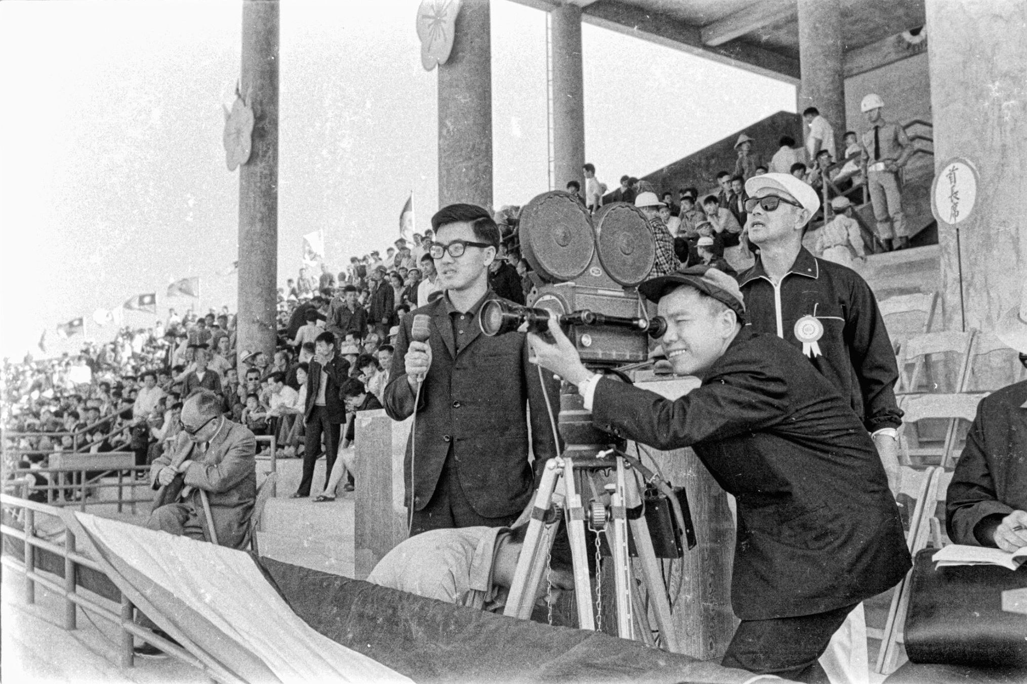 臺視新聞主播盛竹如(持麥克風者)與臺視新聞攝影記者余如季(攝影者)採訪臺灣省運動會開幕典禮。